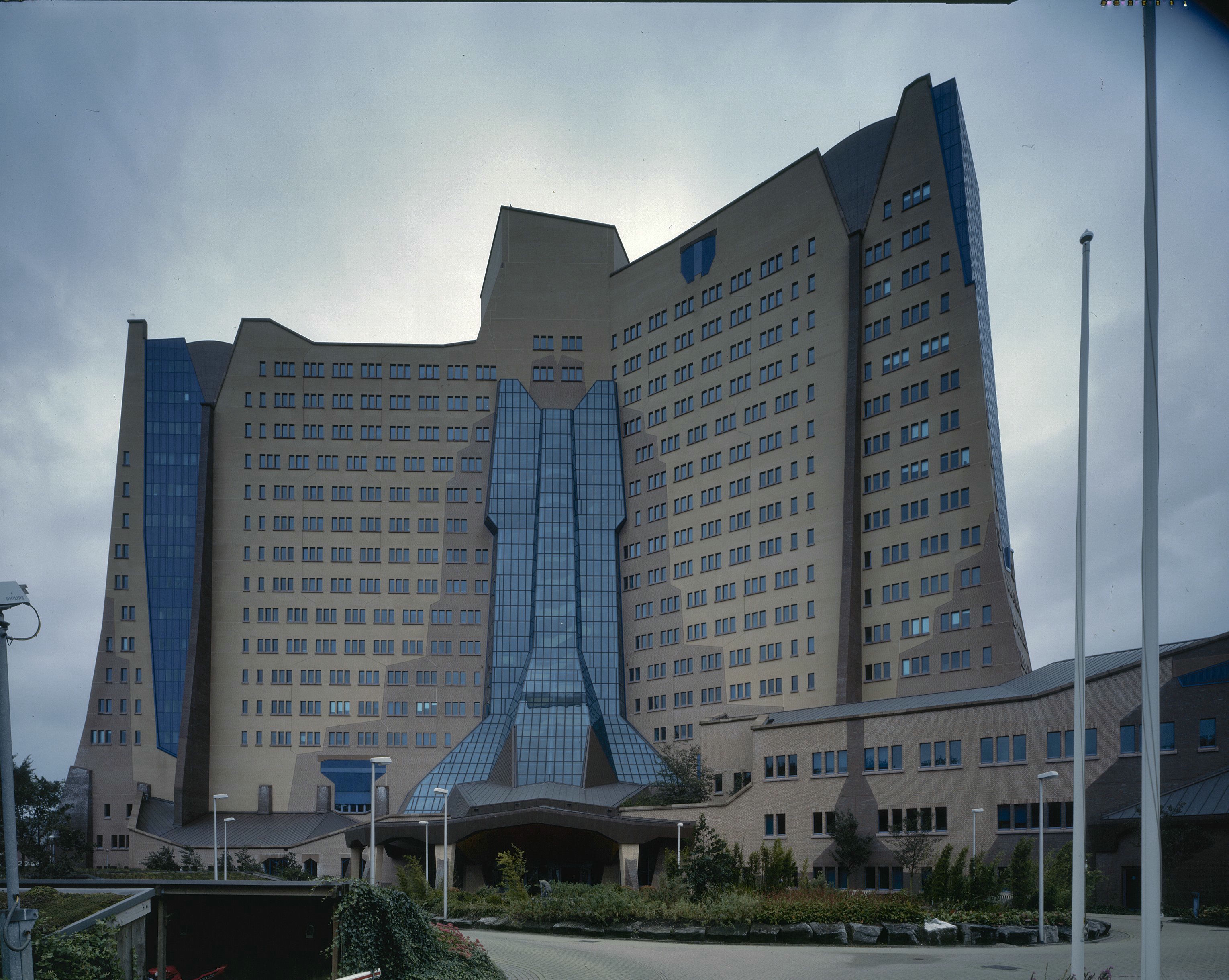 Hoofdkantoor Gasunie, Groningen, voorgevel, 1998 (gefotografeerd voor Monumenten In Nederland Groningen)